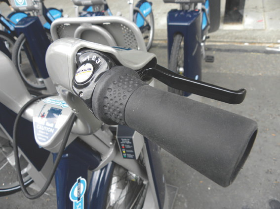 Boris bike